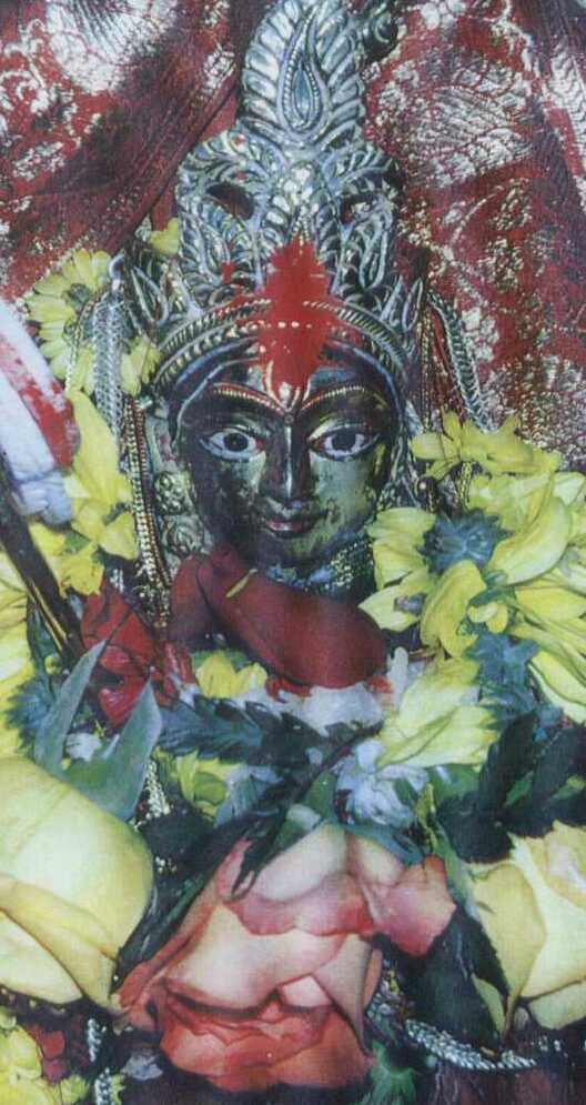 Durga, Hindu Goddess